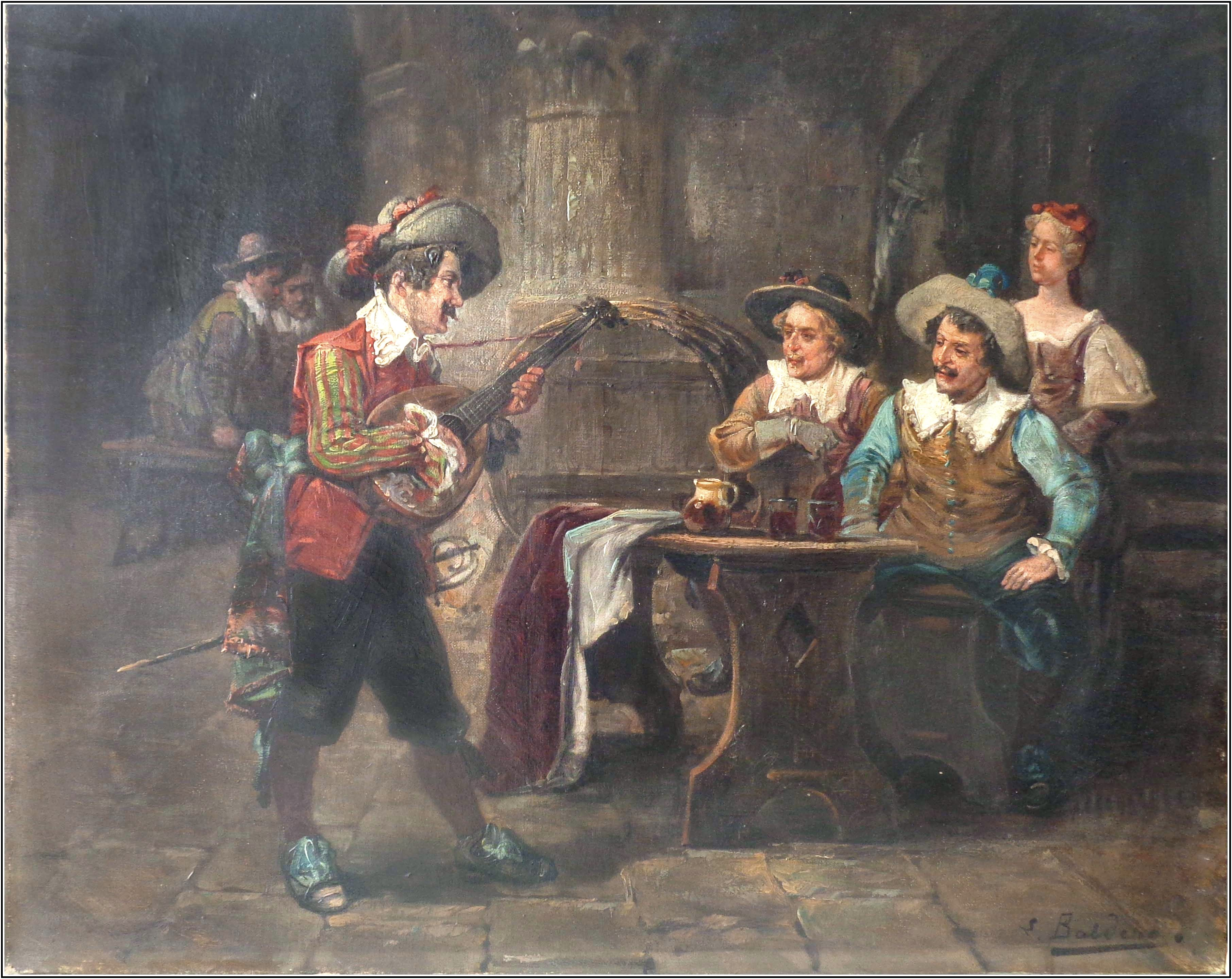 Луиджи Джорджио Бальдеро. Мушкетеры и музыкант в таверне. 1880. Холст, масло. Размер 65x54 см. Подпись автора справа внизу.